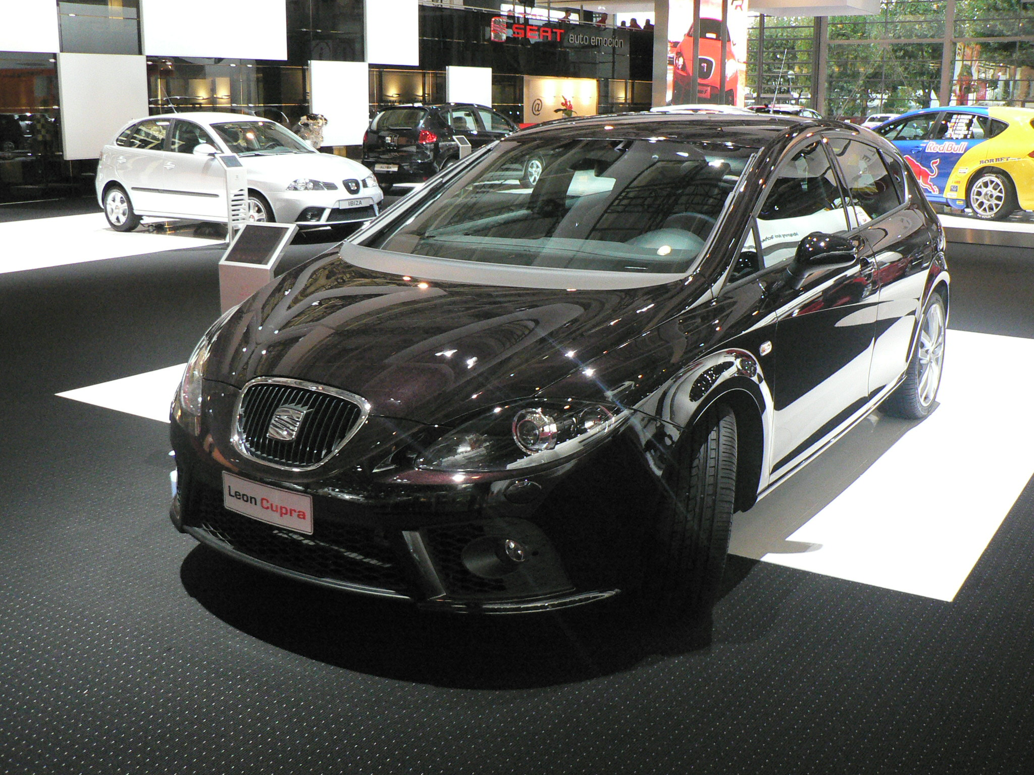 Mondial de l'automobile, Paris 2006